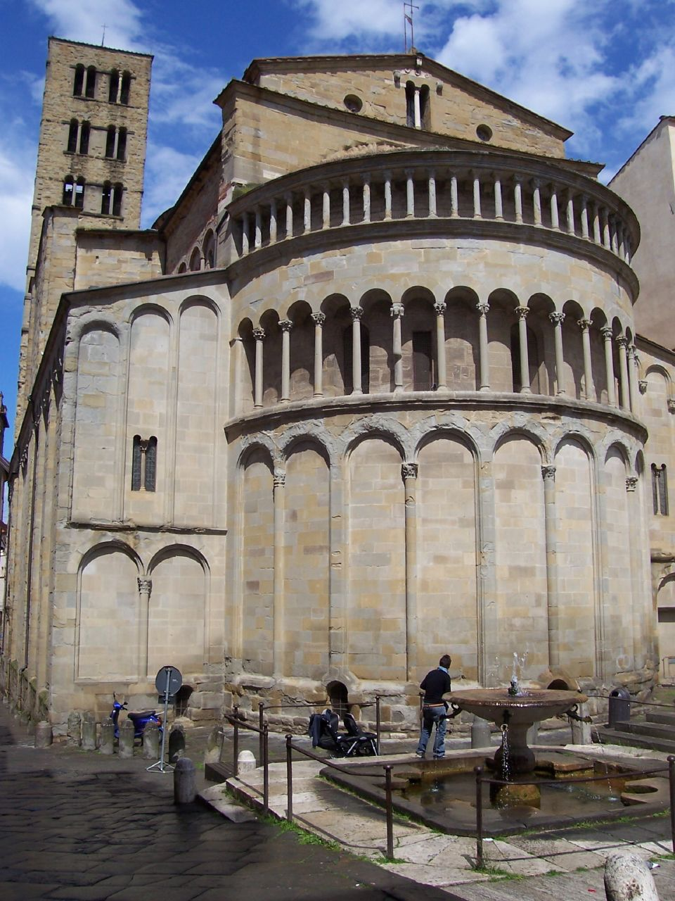 Arezzo, Toscana, ItaliaPieve Santa Maria